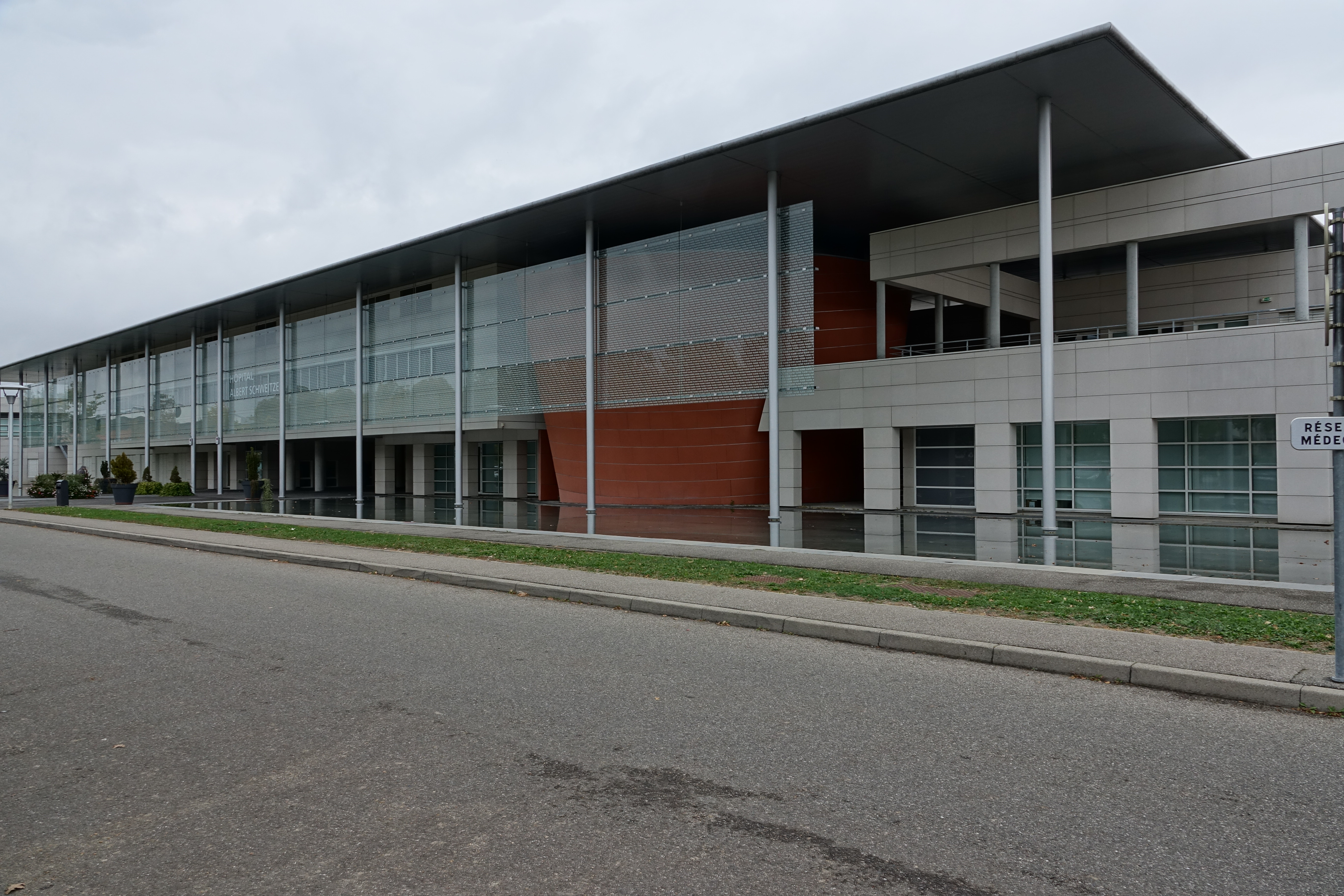 Hôpital Schweitzer à Colmar (Haut-Rhin, France).